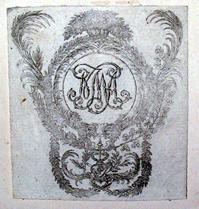 Экслибрис Нестора Максимовича Амбодик-Максимовича